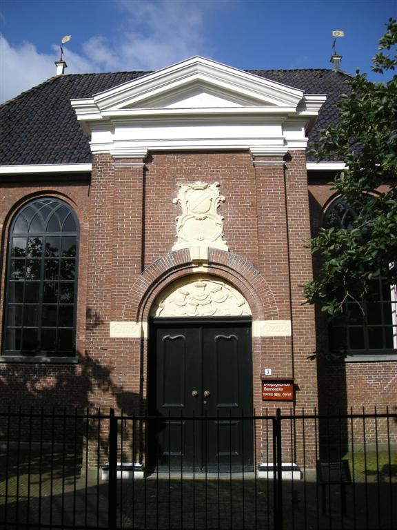 Doopsgezinde kerk te Heerenveen (church)